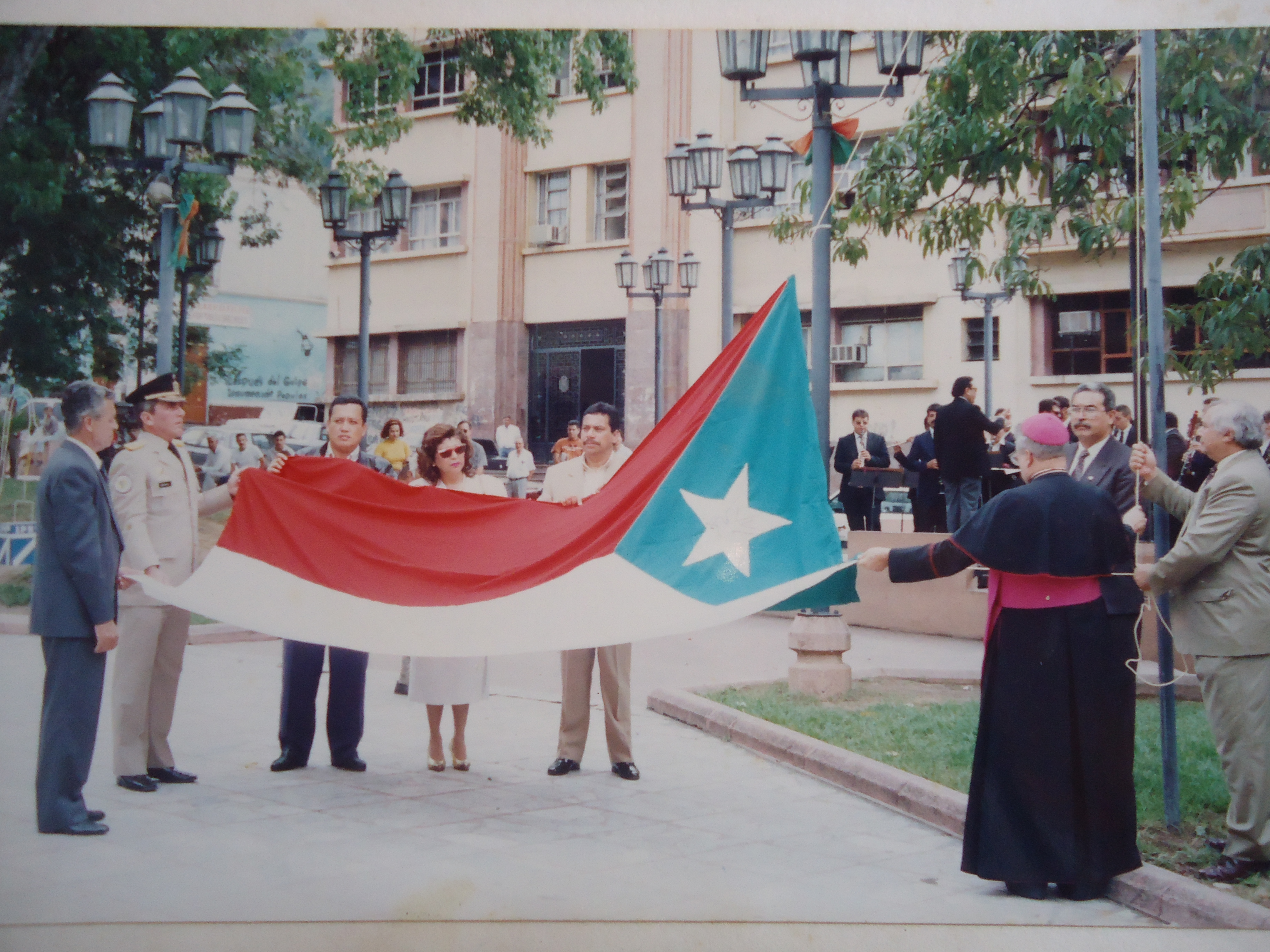 1er Izamiento de la Bandera del Estado Trujillo el 09/10/1994